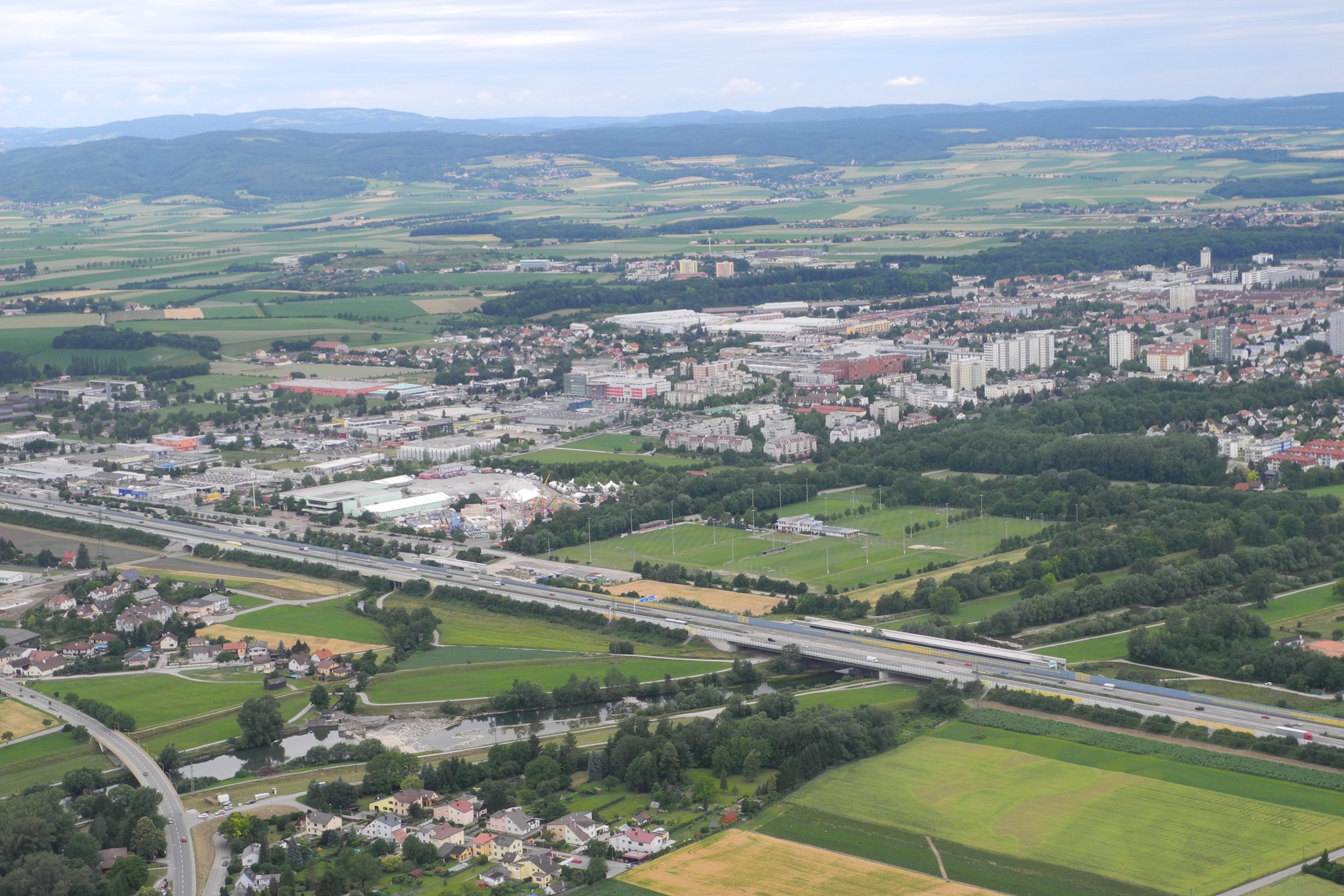 St. Pölten VFR Ostösterreich